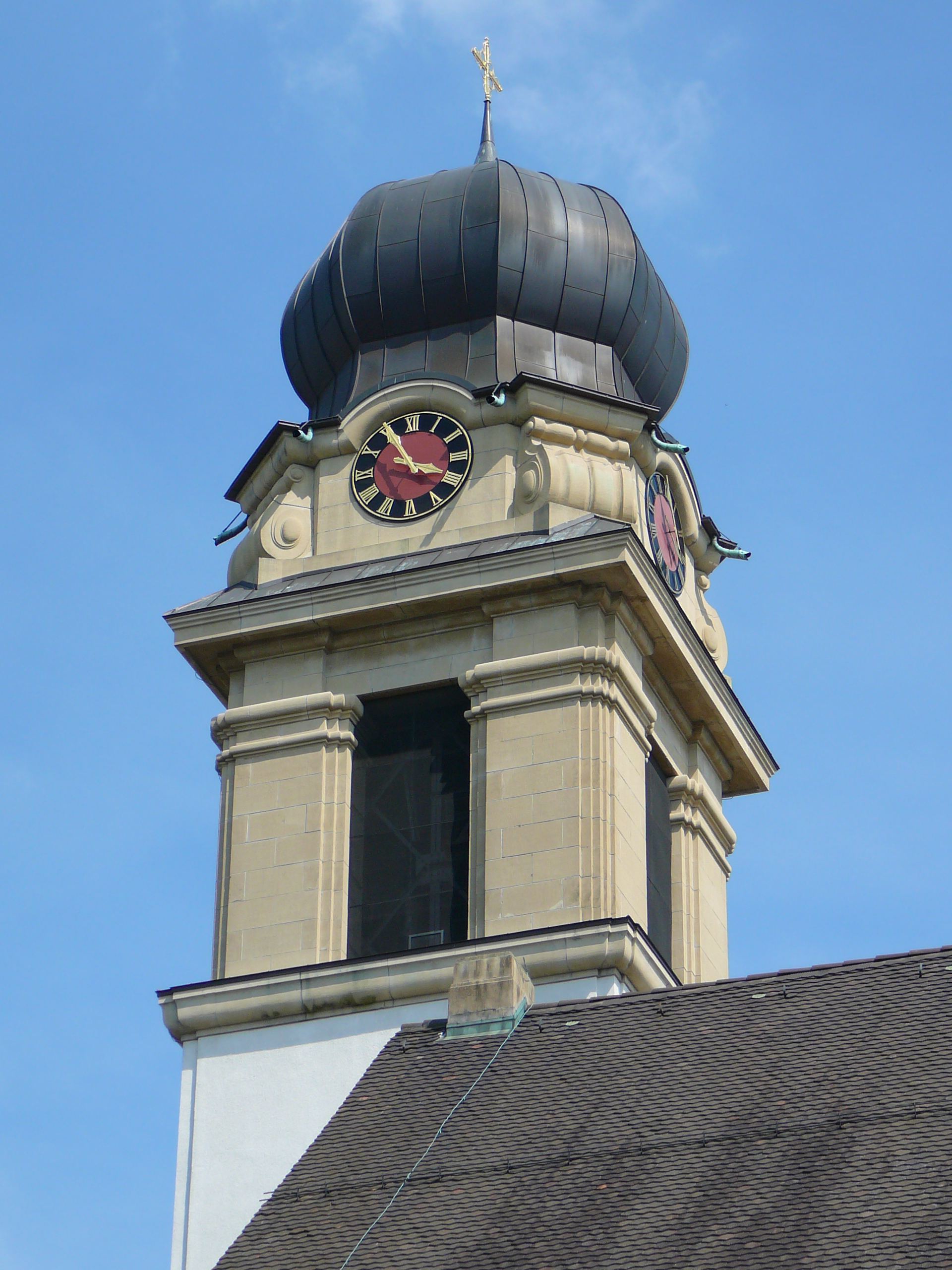 Römisch-katholische Kirche St. Josef Zürich-Industriequartier, Kirchturm von Nordwesten